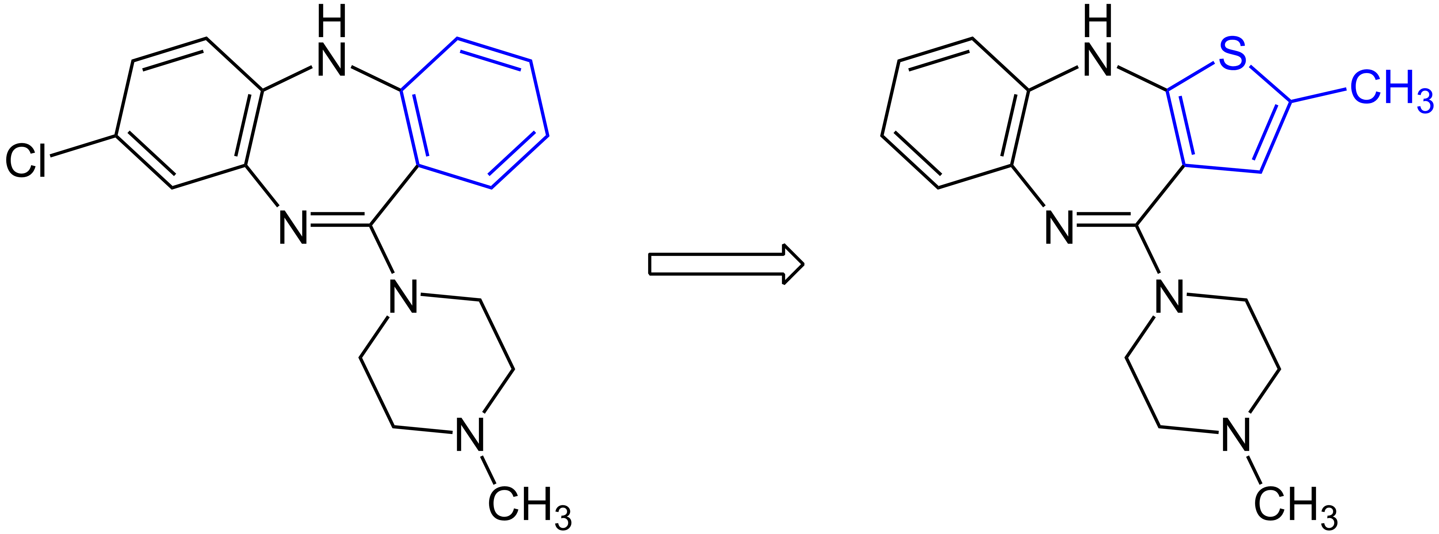 Bioisosterer Austausch des Benzolrings durch Methylthiophen